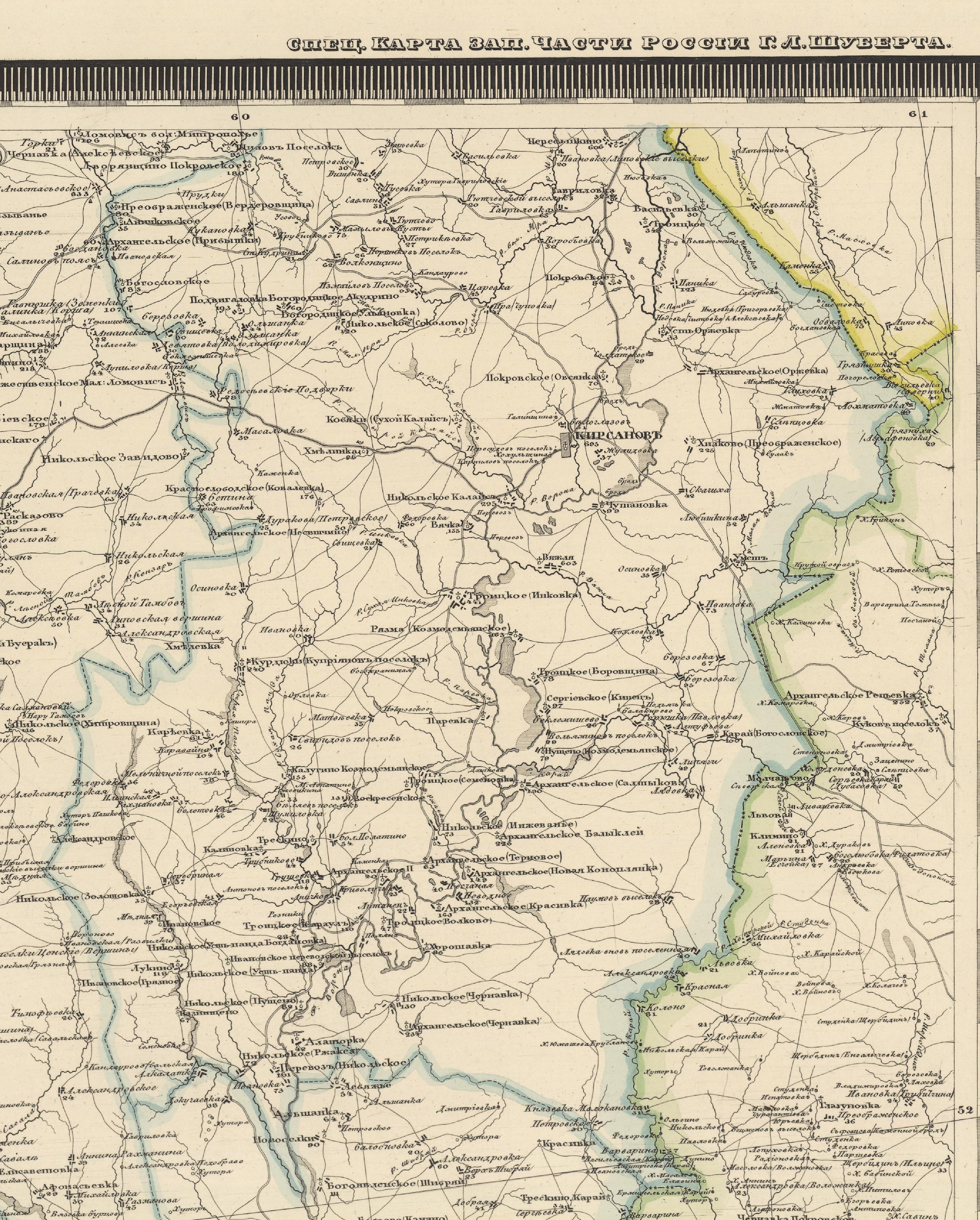 Россия, Тамбовская губ., Кирсановский уезд. Из карты России изд.1853.Г.Л.Шуберт.